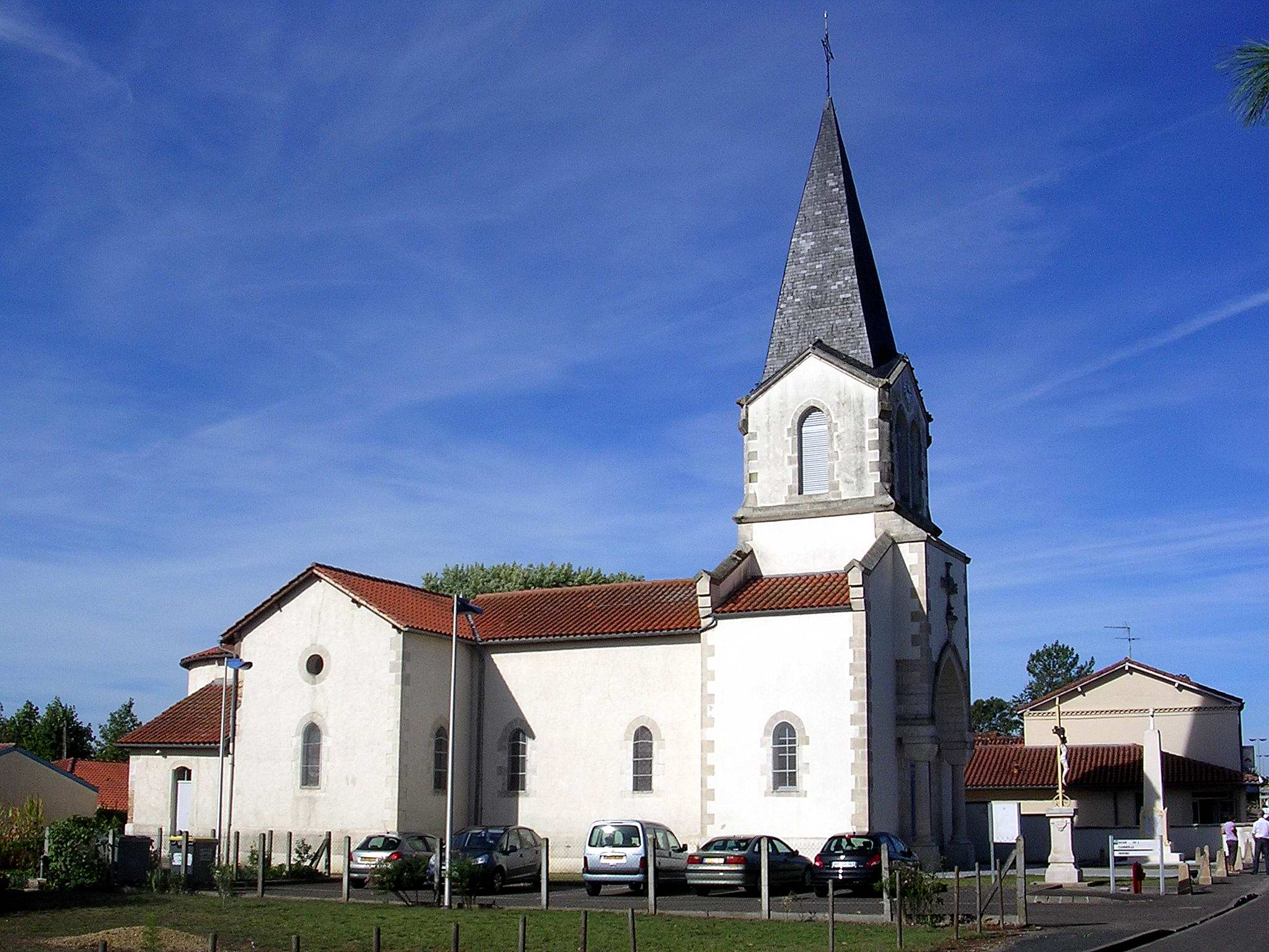 Eglise de Haut-Mauco, dans le département français des Landes